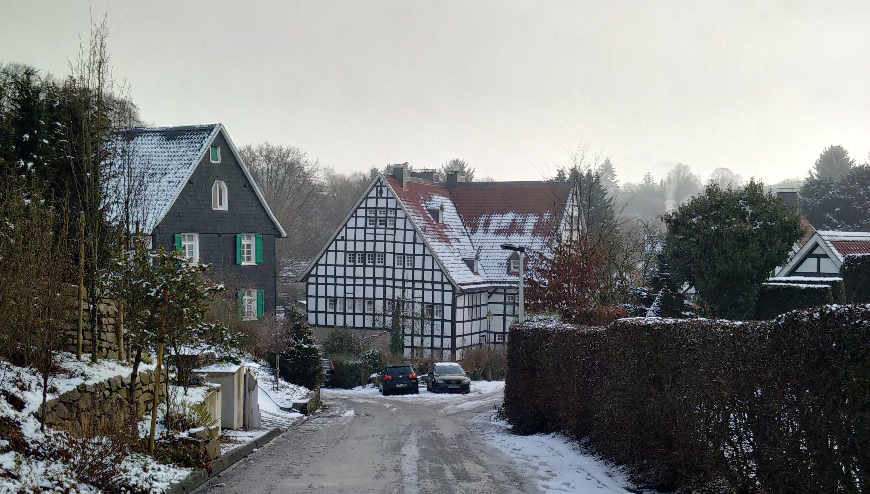 Hofschaft Dahl in Solingen, aufgenommen im Winter 2016/2017